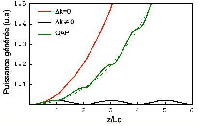 Génération paramétrique du signal en fonction de la longueur, avec (en rouge) ou sans (en noir) accord de phase, dans l'approximation de la pompe non dépeuplée. Source : personnelle Licensing Catégorie:Schéma de physique